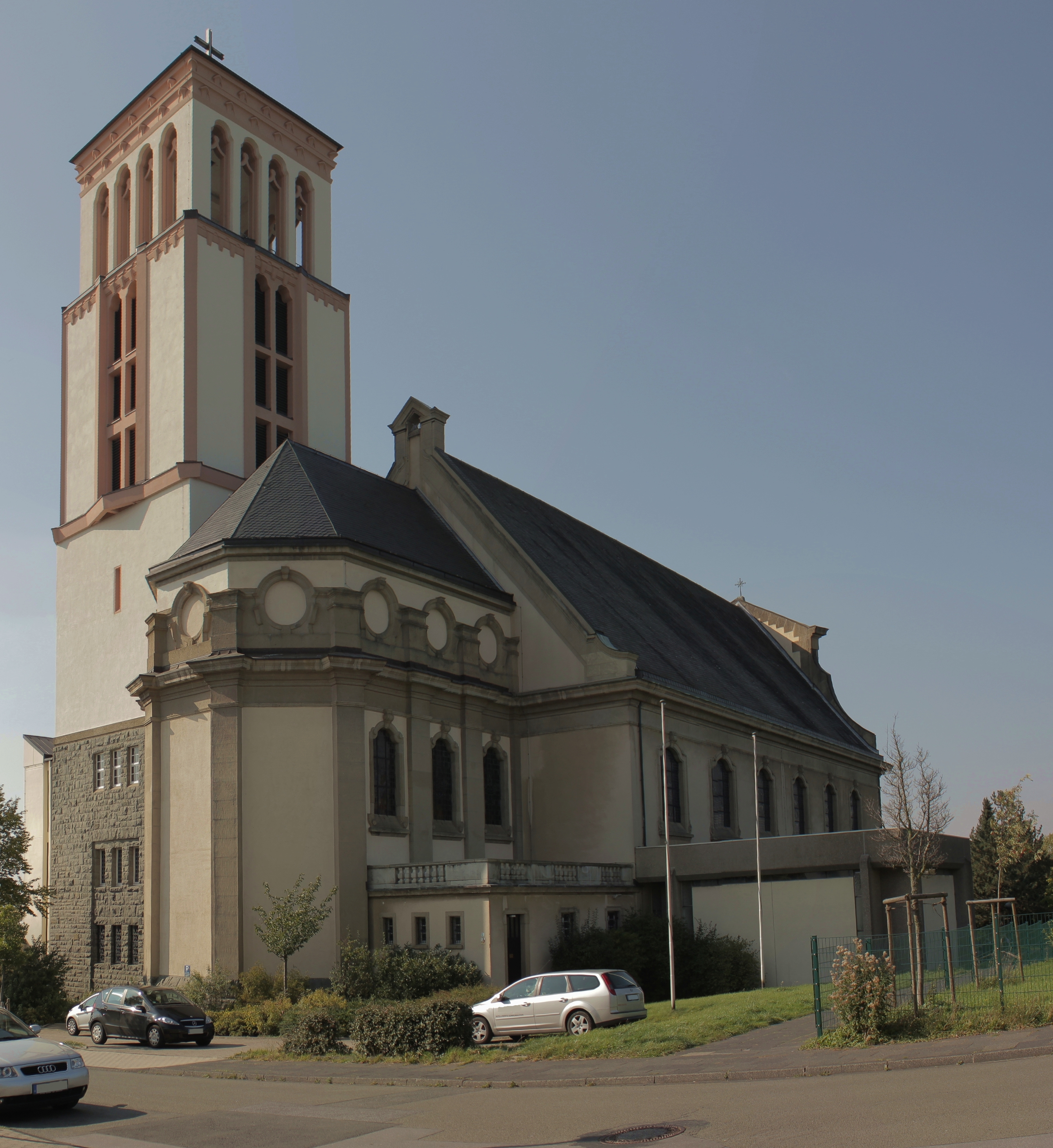 Katholische Klosterkirche St-Elisabeth, Scharnhorststr. 27, Hagen, Ansicht von Süd-Ost This is a photograph of an architectural monument.